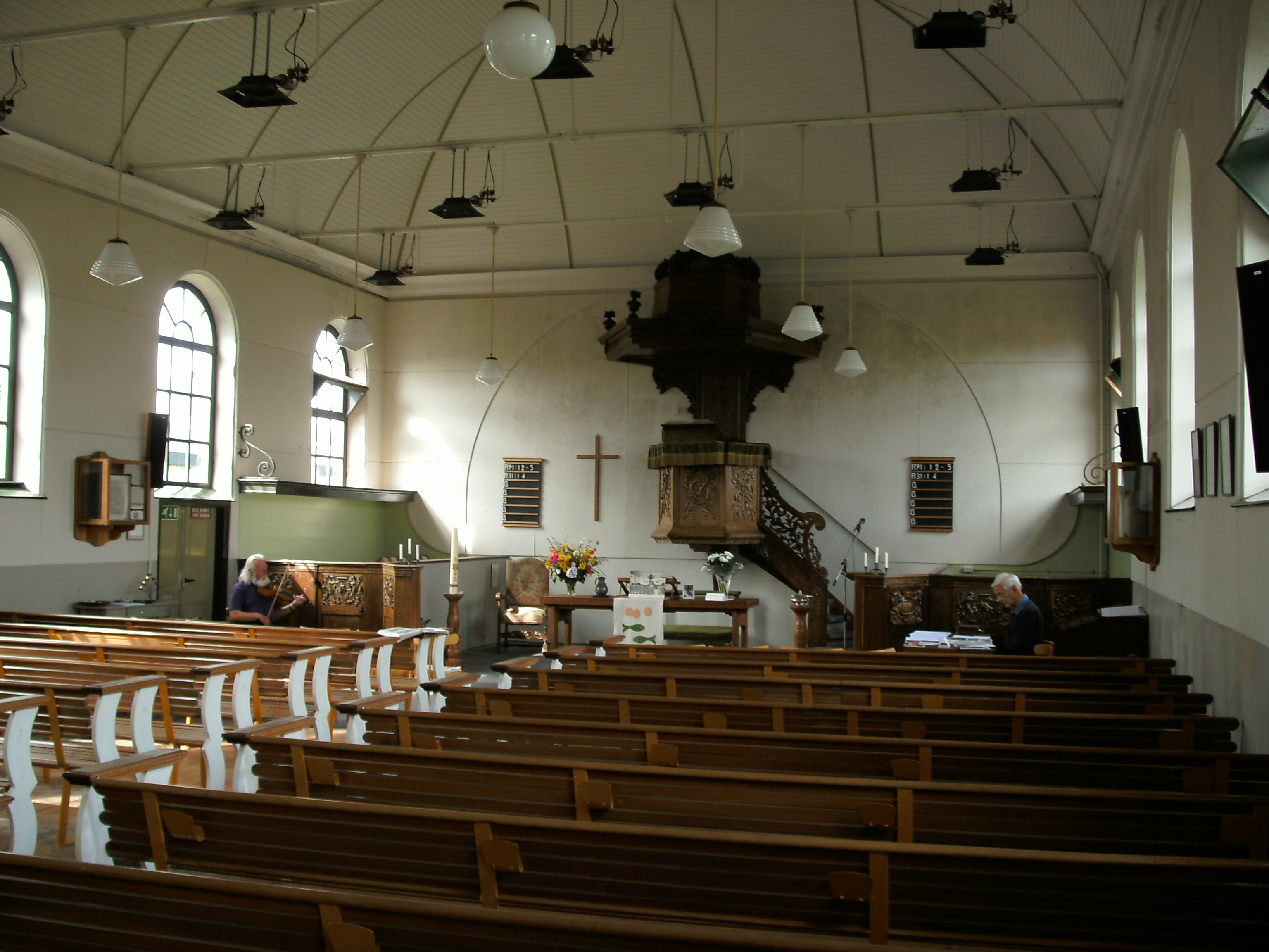 Interieur Waddenkerk - De Cocksdorp